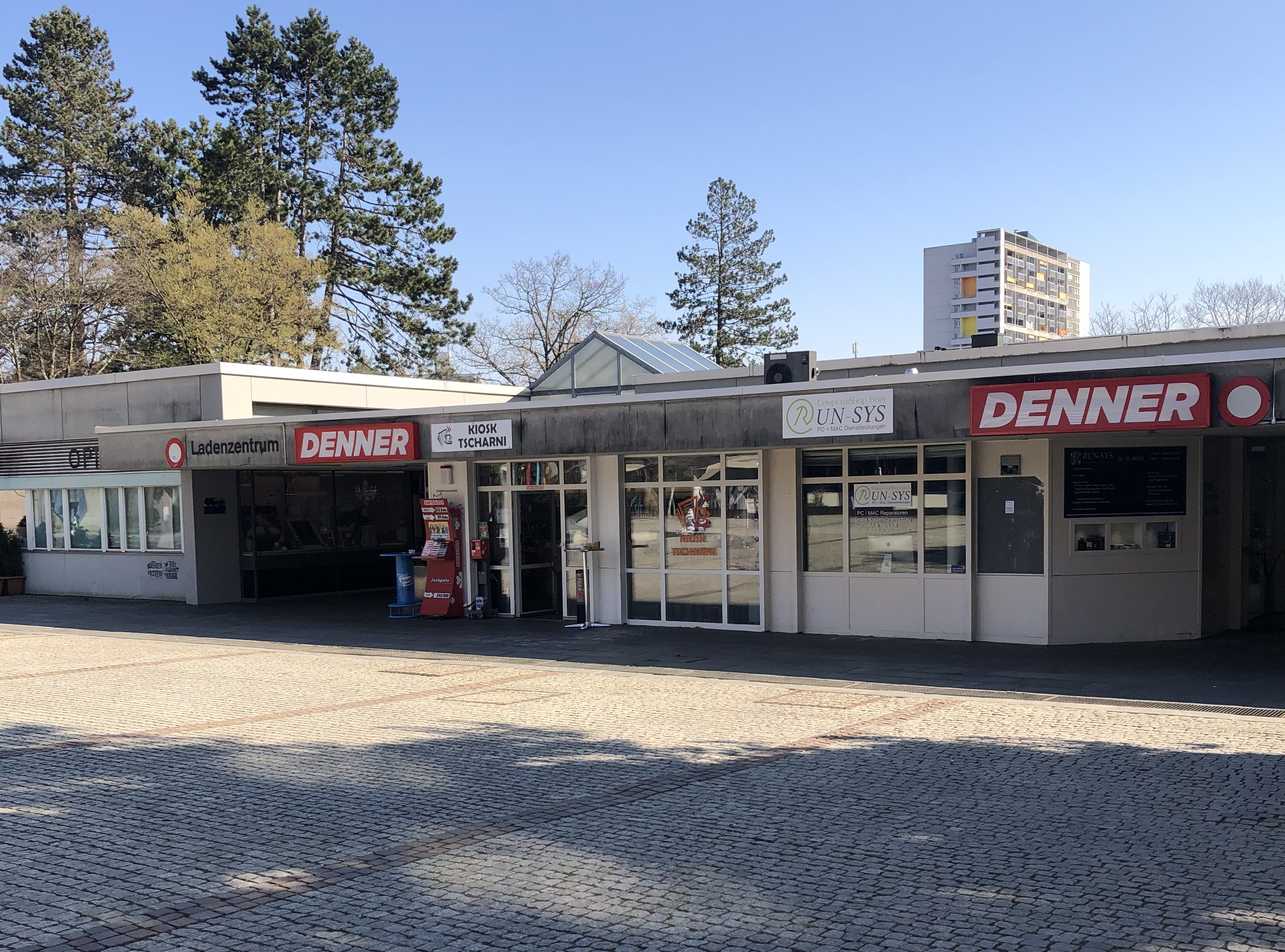 Tscharnergut Plaza Einkaufszentrum